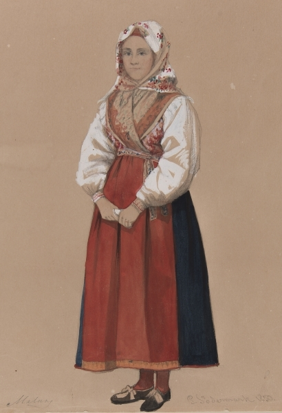 "Malung". Kvinna i dräkt. Akvarell av P Södermark. Depicted place: Dalarna (Q205218)